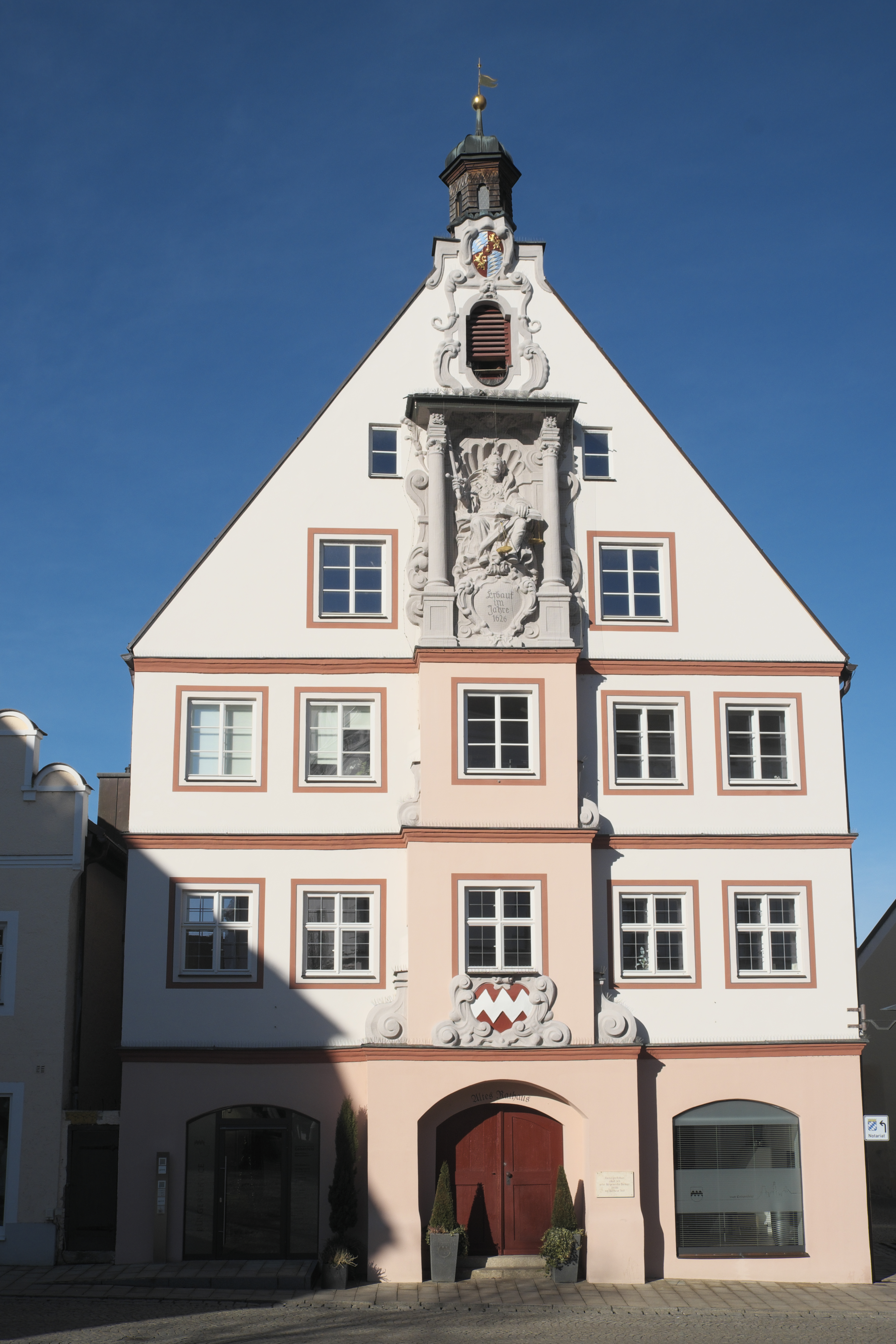 Altes Rathaus in Geisenfeld im Landkreis Pfaffenhofen an der Ilm (Bayern/Deutschland)